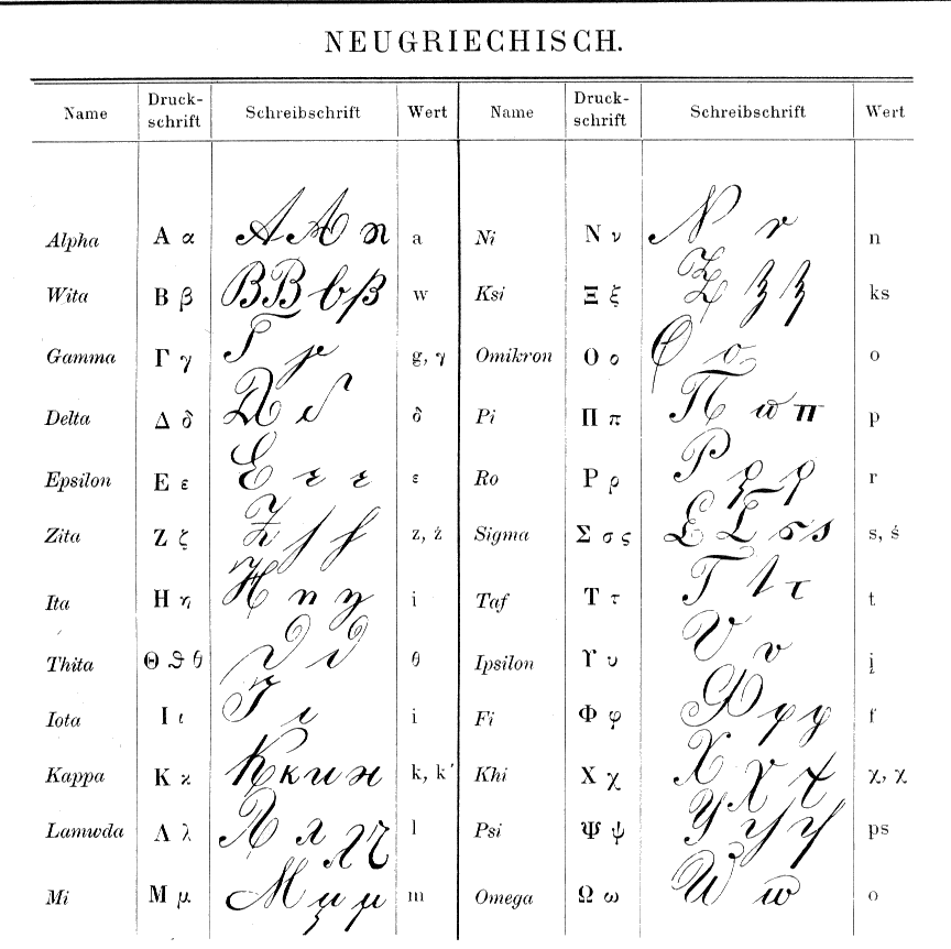 XIXth century Greek Handwriting